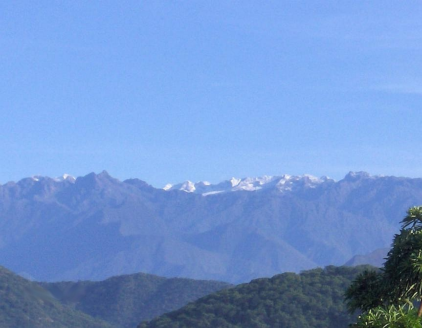 Sierra Nevada de Santa Marta desde Valledupar, Colombia.